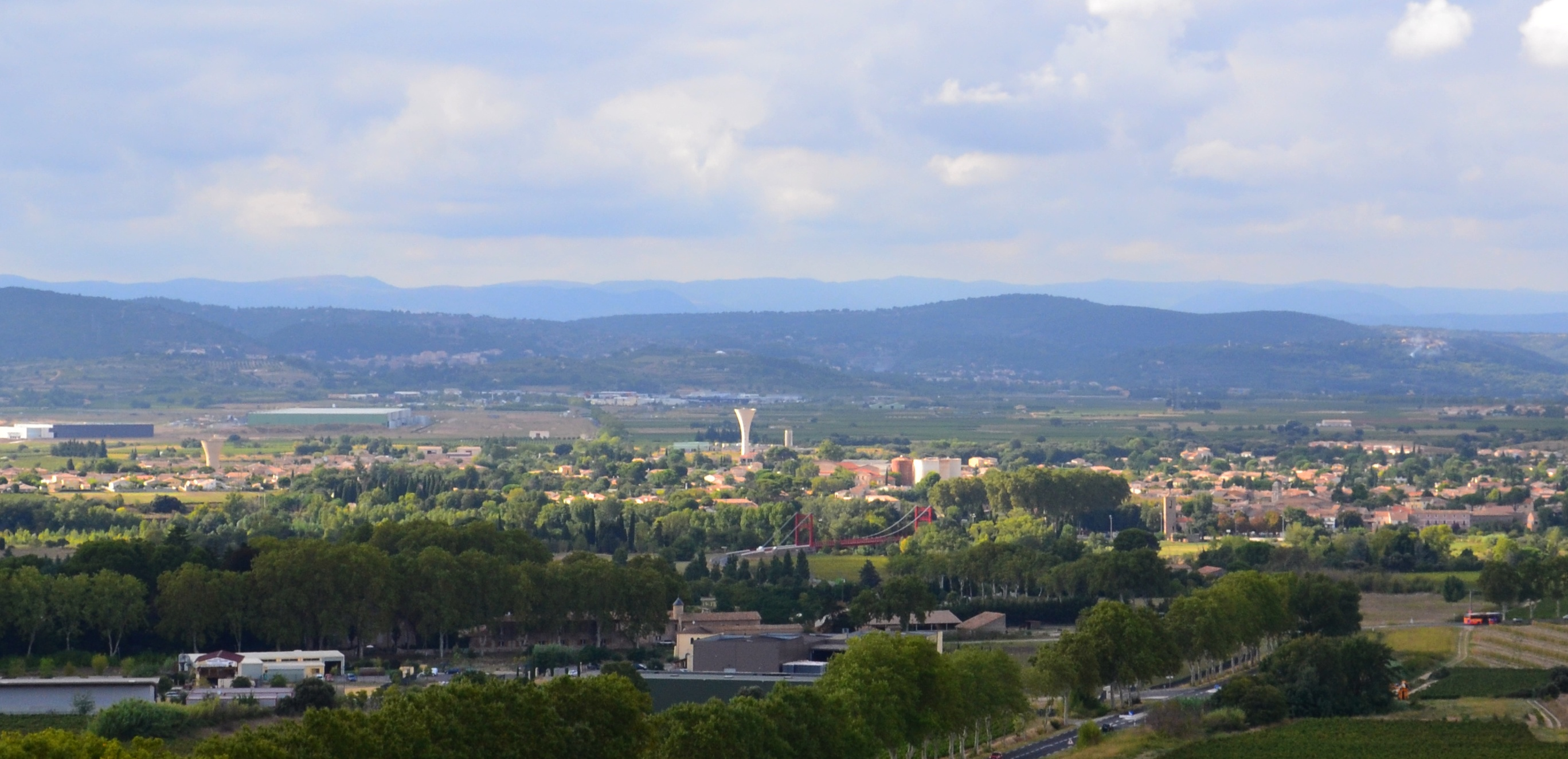 Canet, Hérault : vue générale.